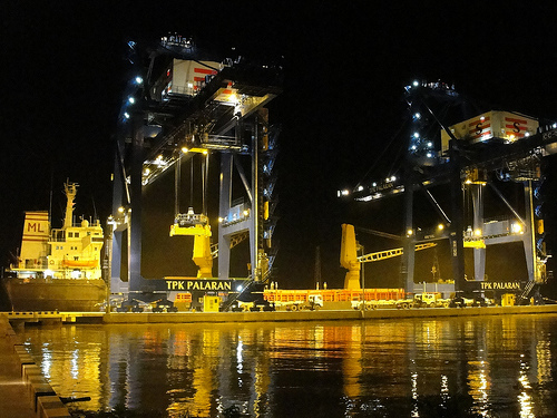 Dermaga Palaran saat malam hari